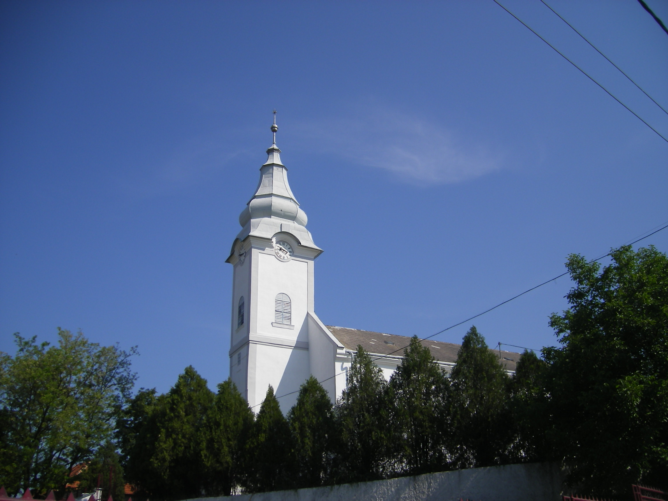 Madar, református templom